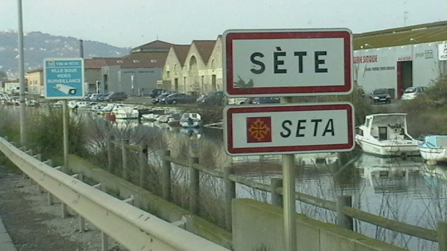 Walon: plake e-n occitan "Seta" a l' intrêye di Sete